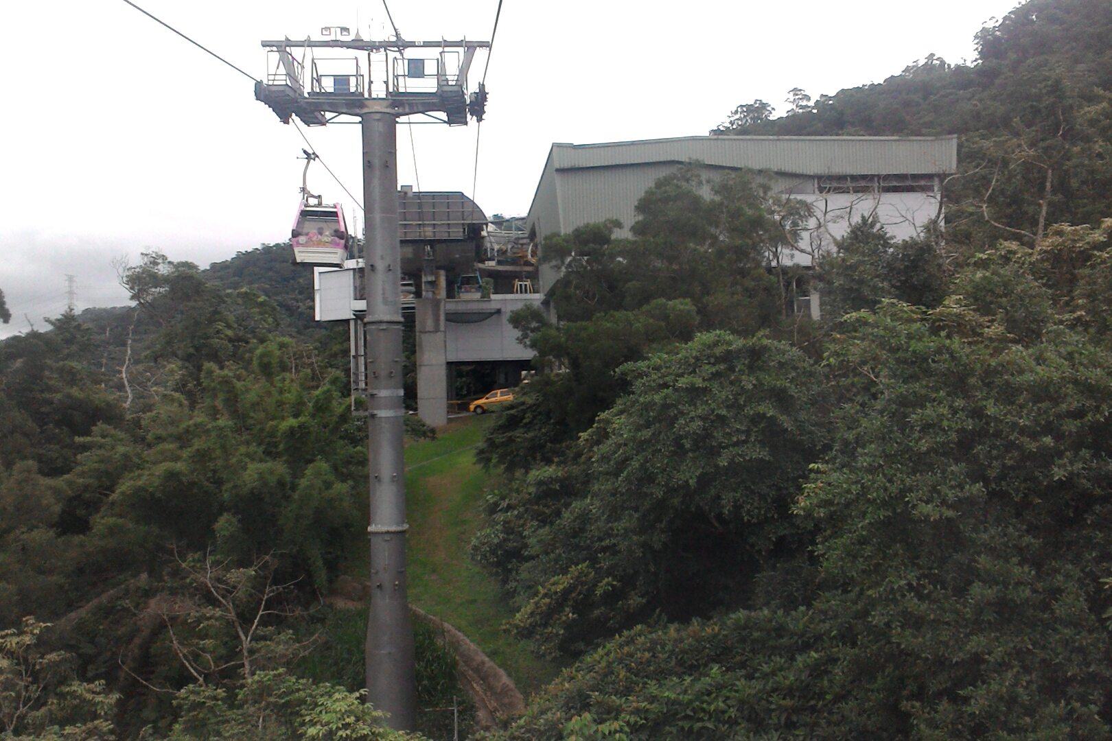 貓空纜車轉角二站,台北市文山區二格山次分區政大里